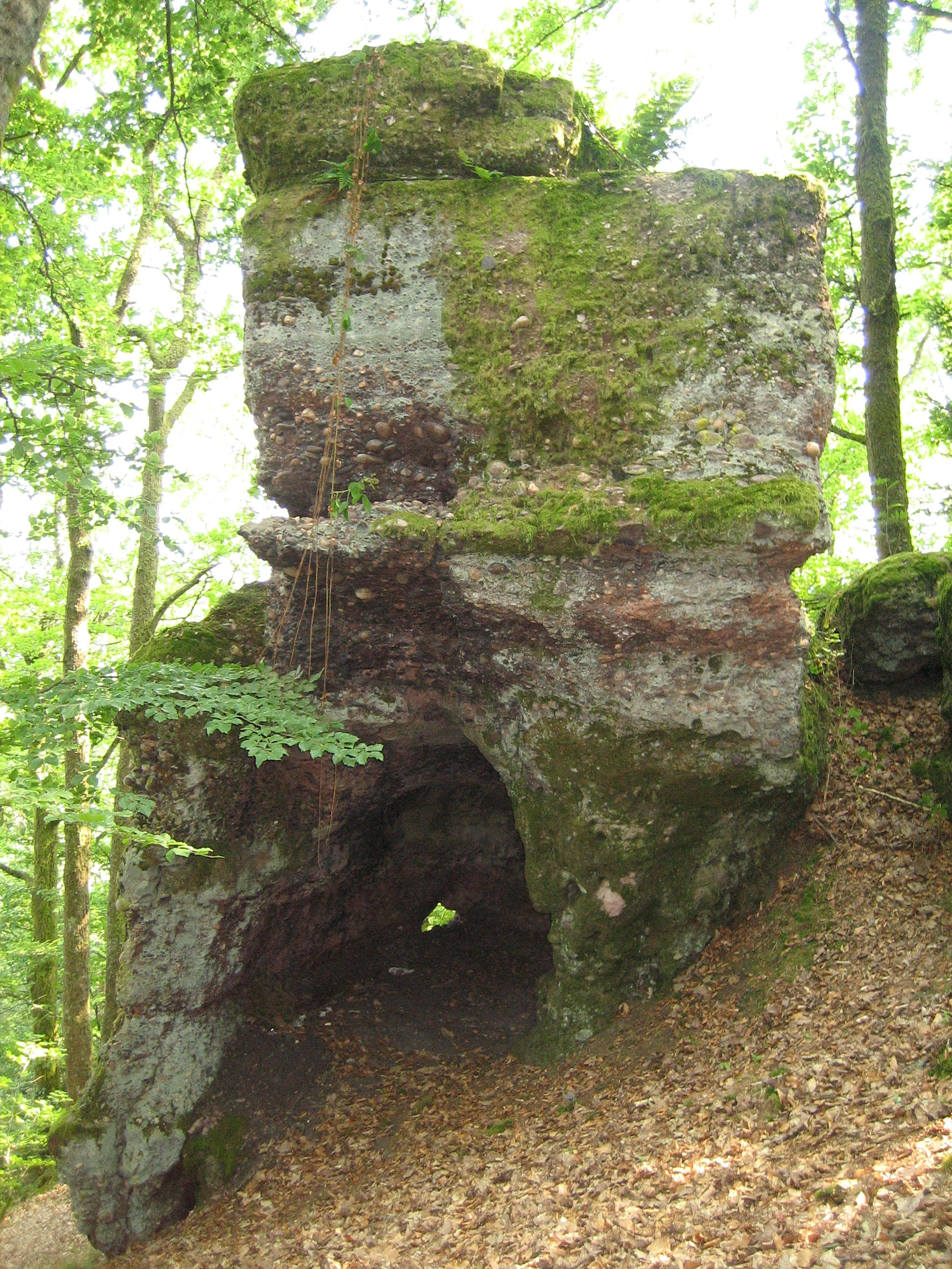 Tête du Fourneau/Roche du Fournel (Deycimont, Vosges, France), by Raphaël Tassin (raphdvoj), 2006/07